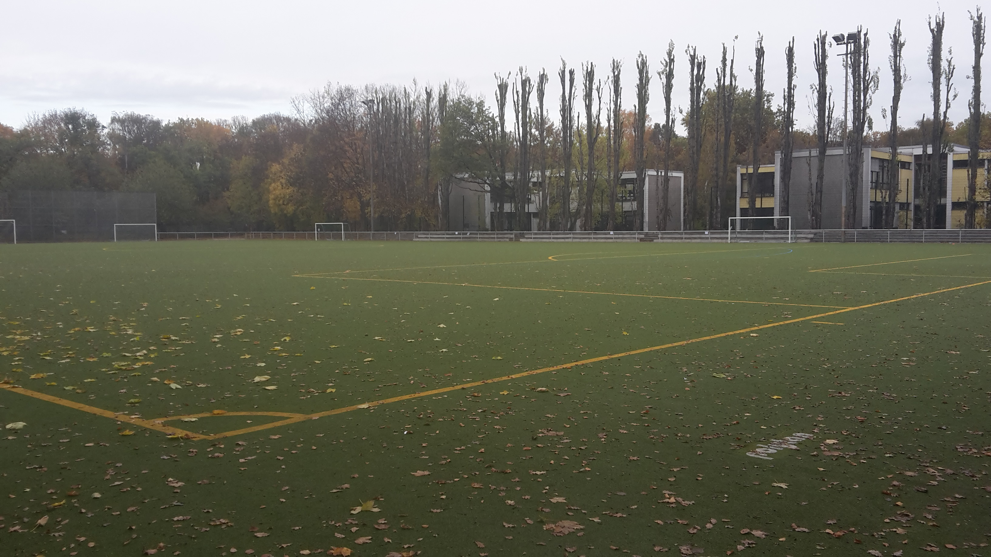 Sportplatz Ungarnstraße, Heimstätte von BFC Meteor 06